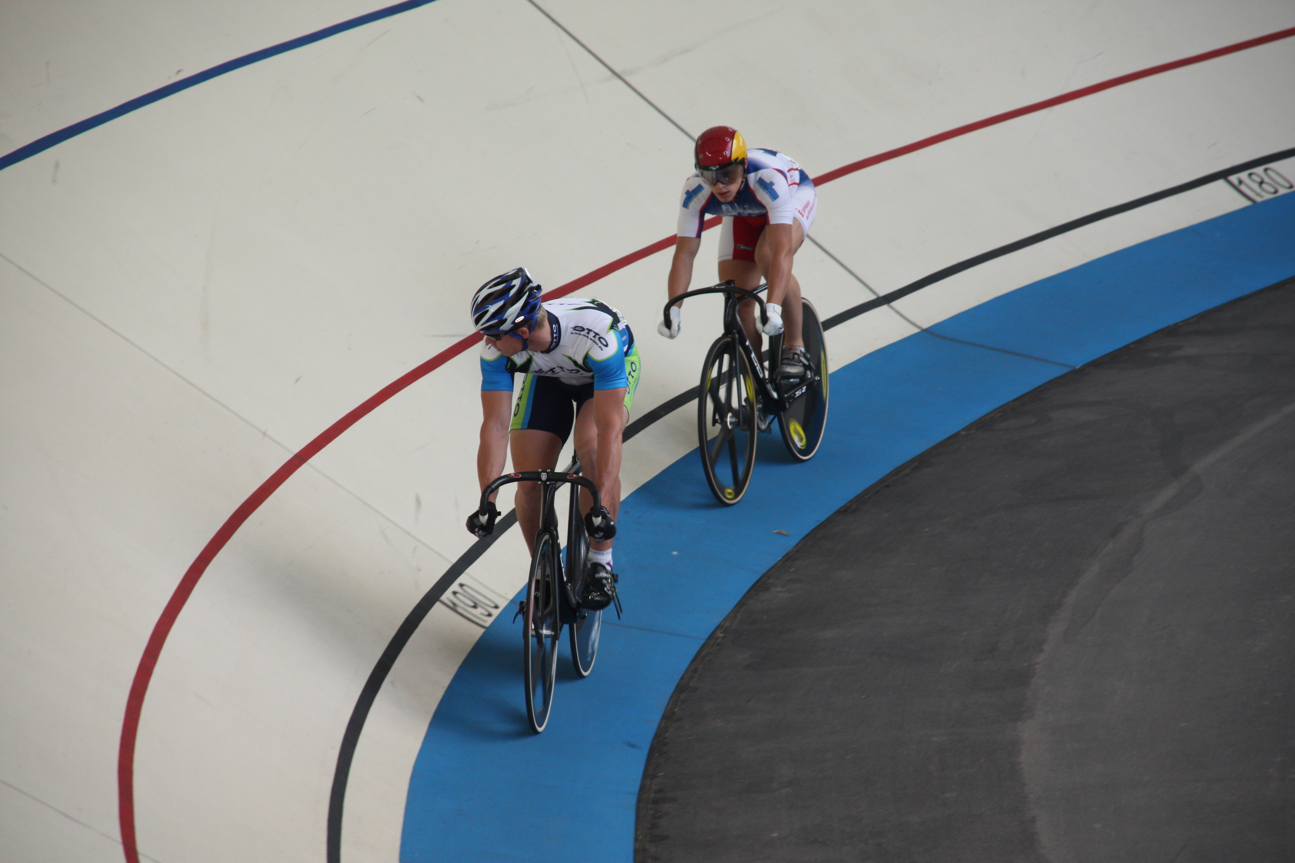 Erste Runde eines Sprint-Laufs zwischen Sebastian Döhrer (v.) und Marc Schröder bei der 123. Deutschen Meisterschaft 2009 im Erfurter Andreasried